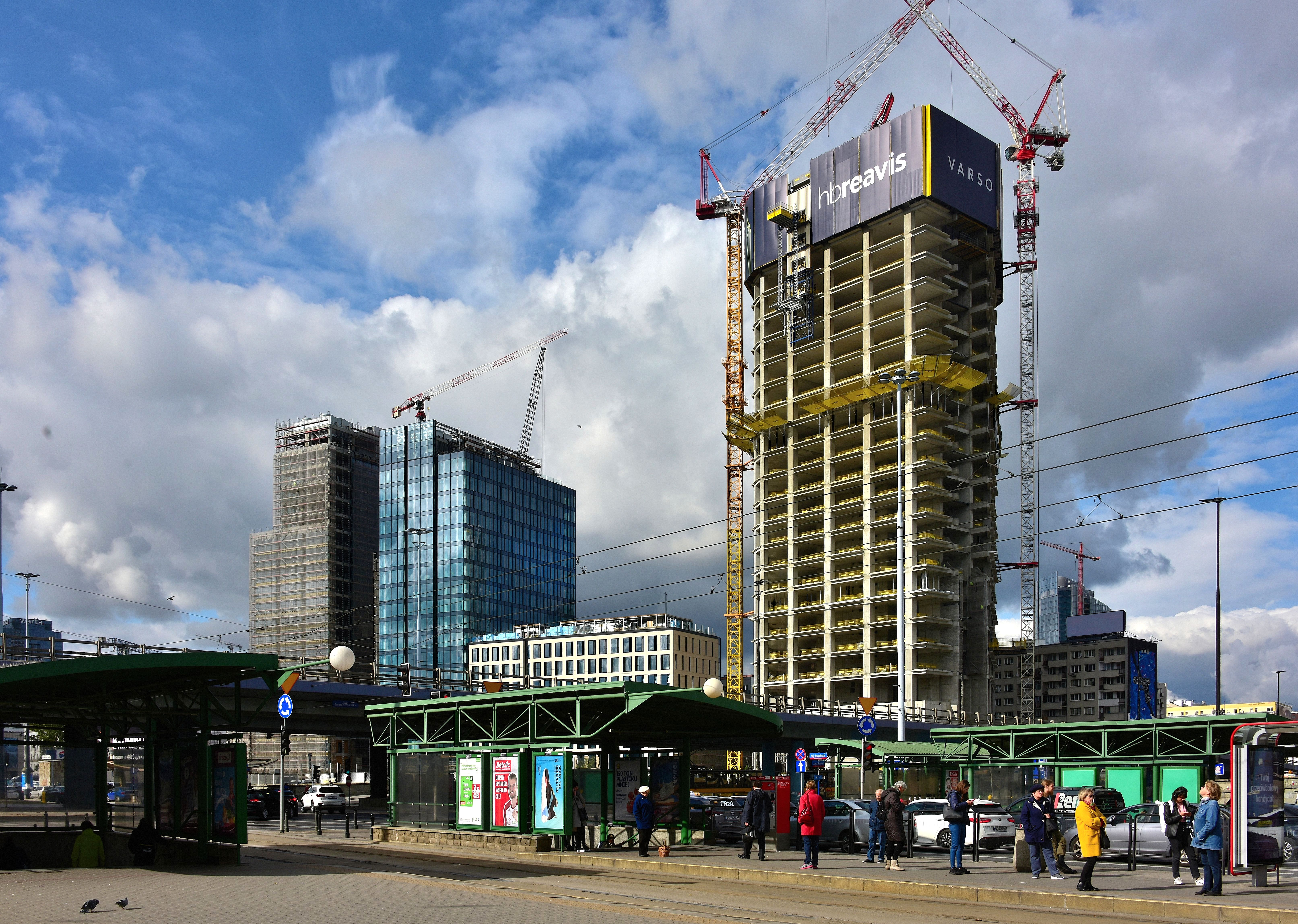 Biurowiec Varso widziany z Alej Jerozolimskich